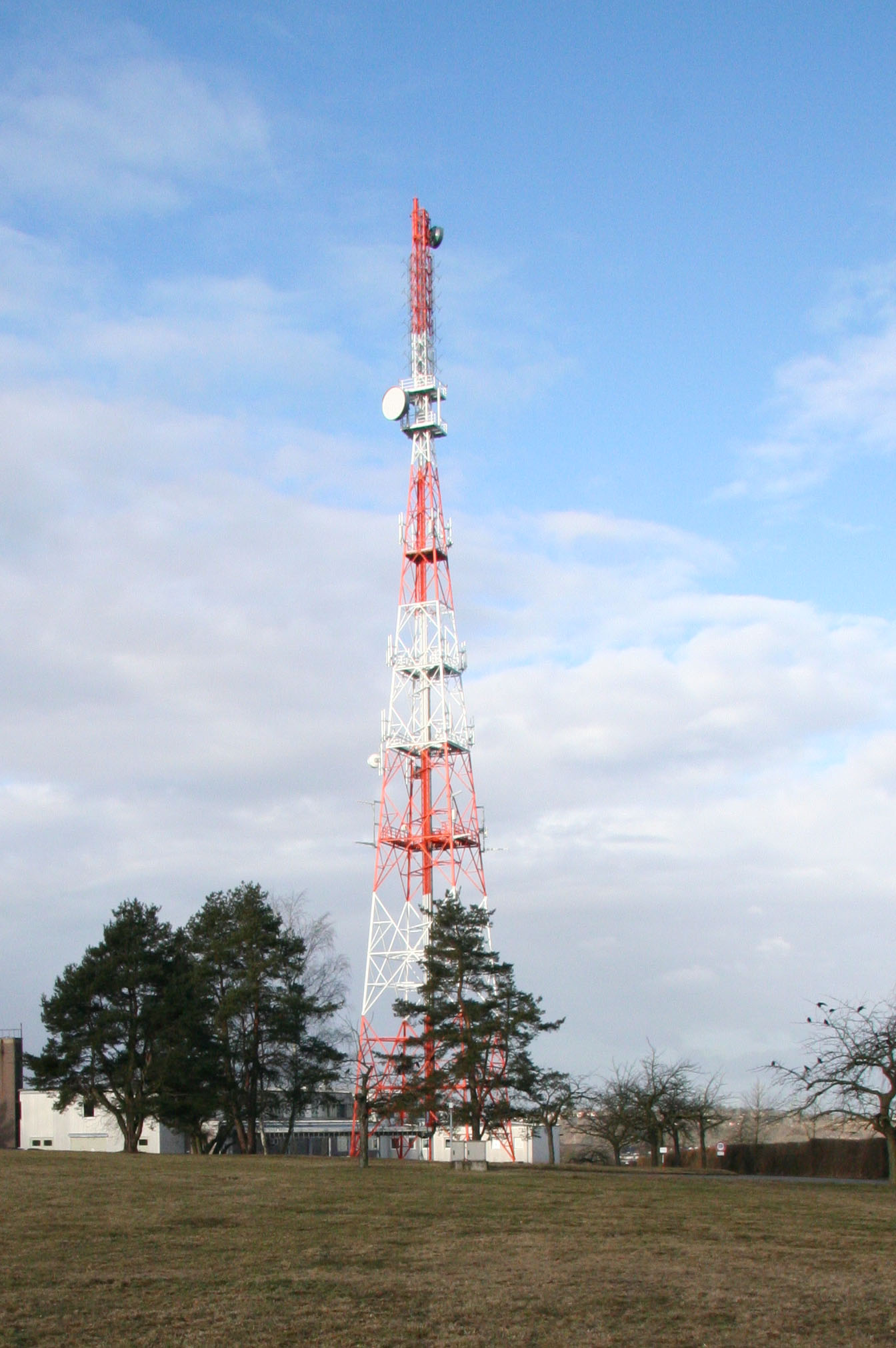 Stahlfachwerkturm der Sendeanlage Mühlacker